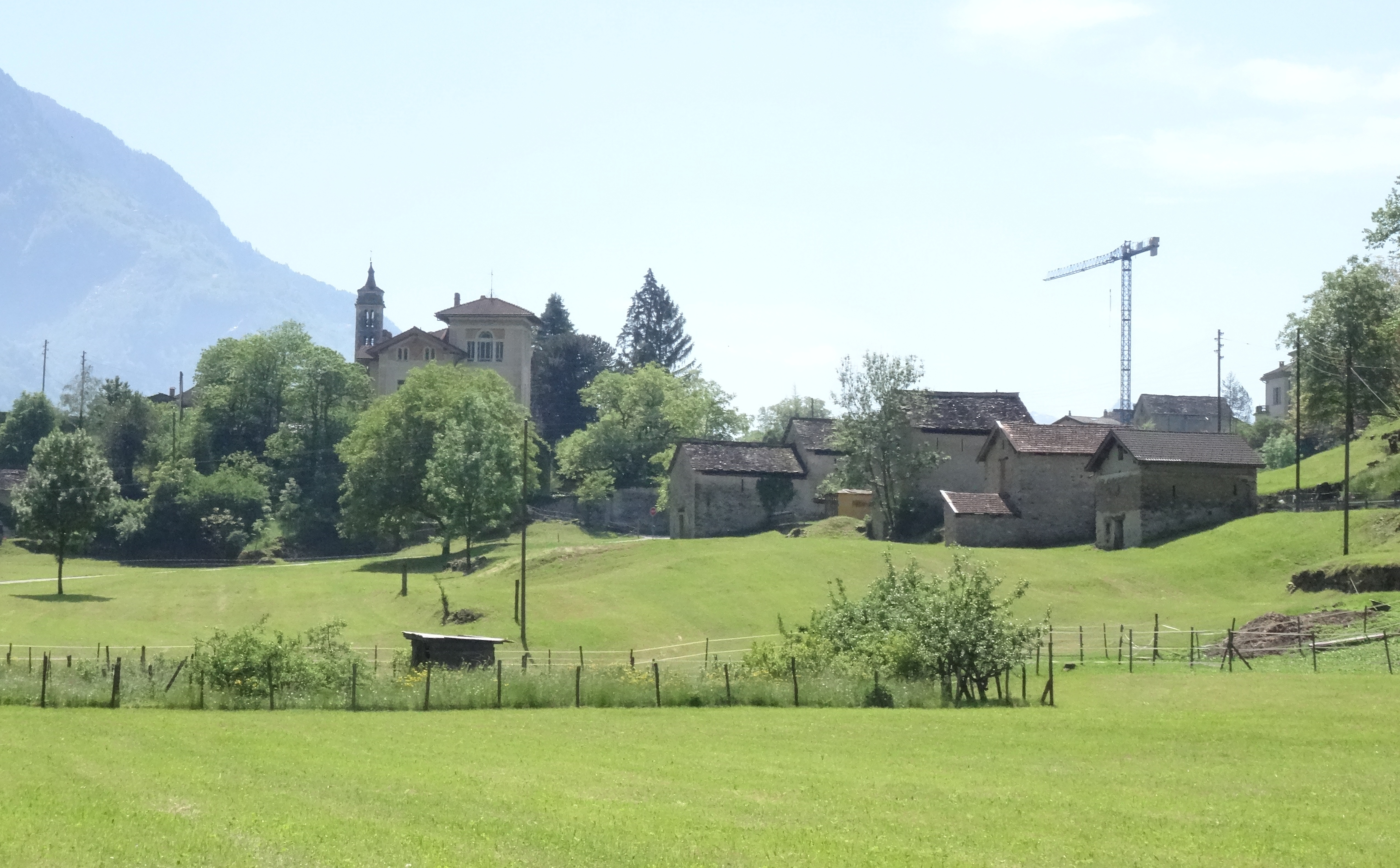 Ludiano Mai 2015